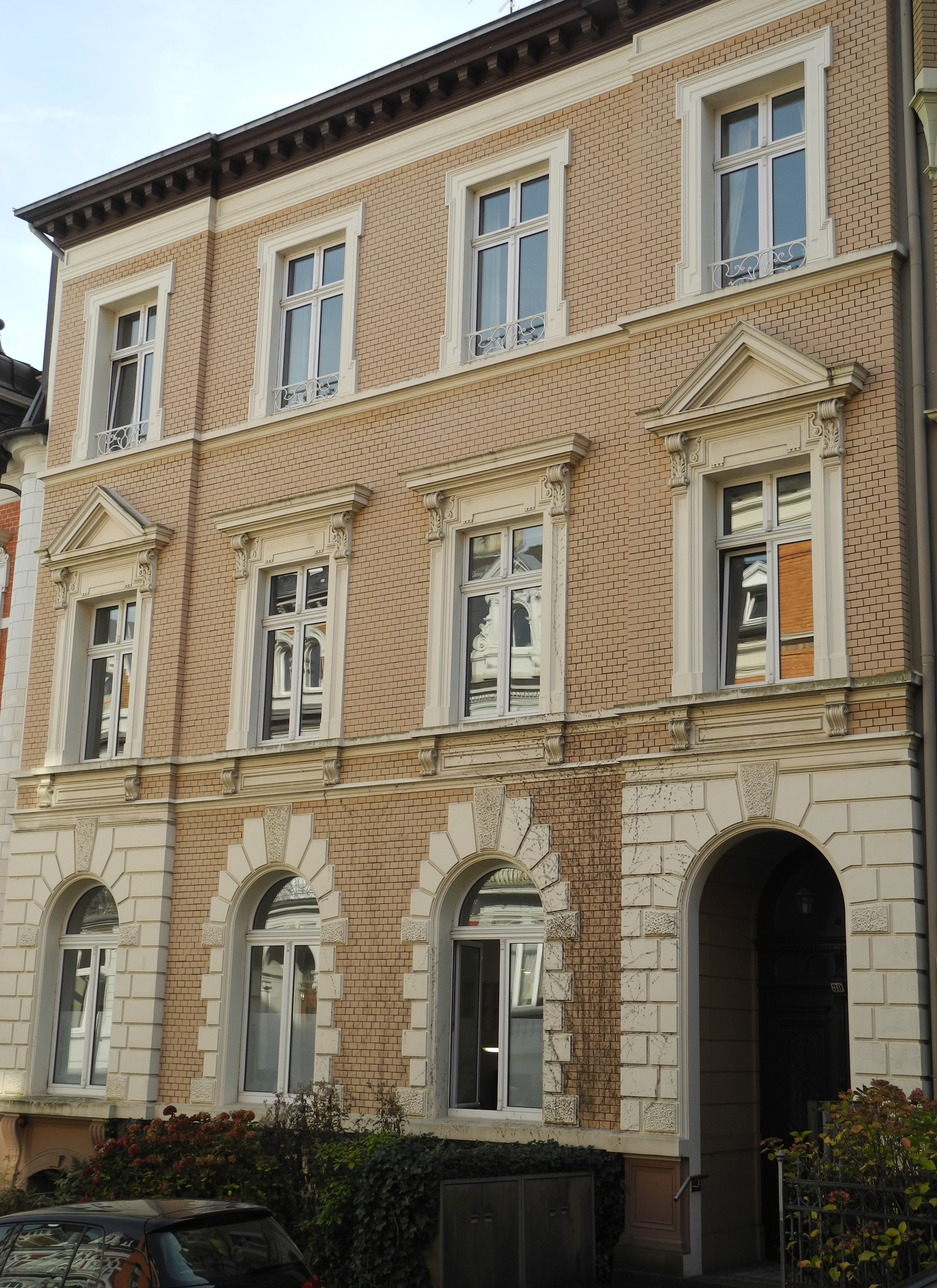 Wuppertal, Wohnquartier Brill, Roonstr. 39